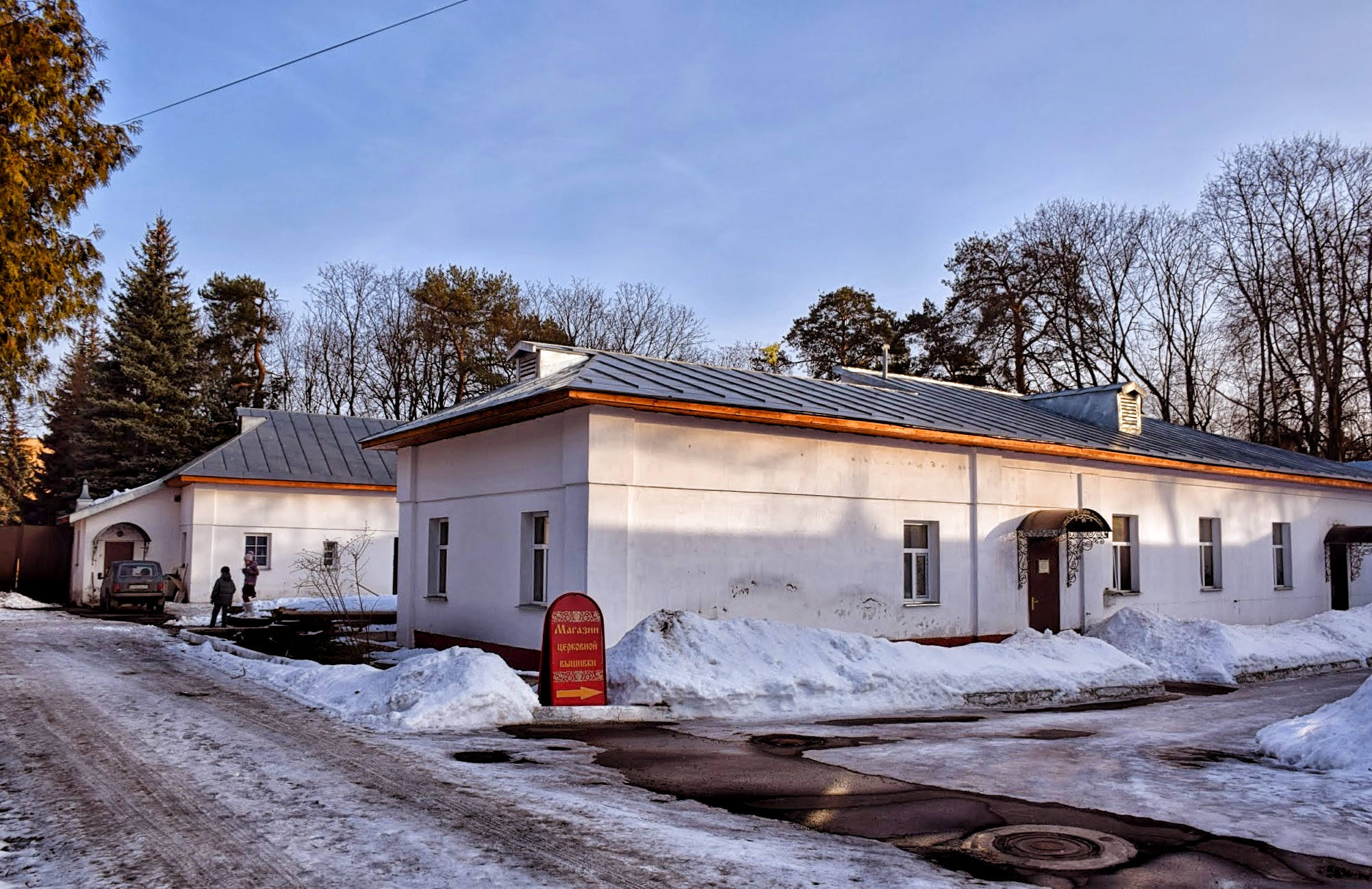 Корпуса братские (два): Петровский проезд, Видное-2, Ленинский район, Московская область